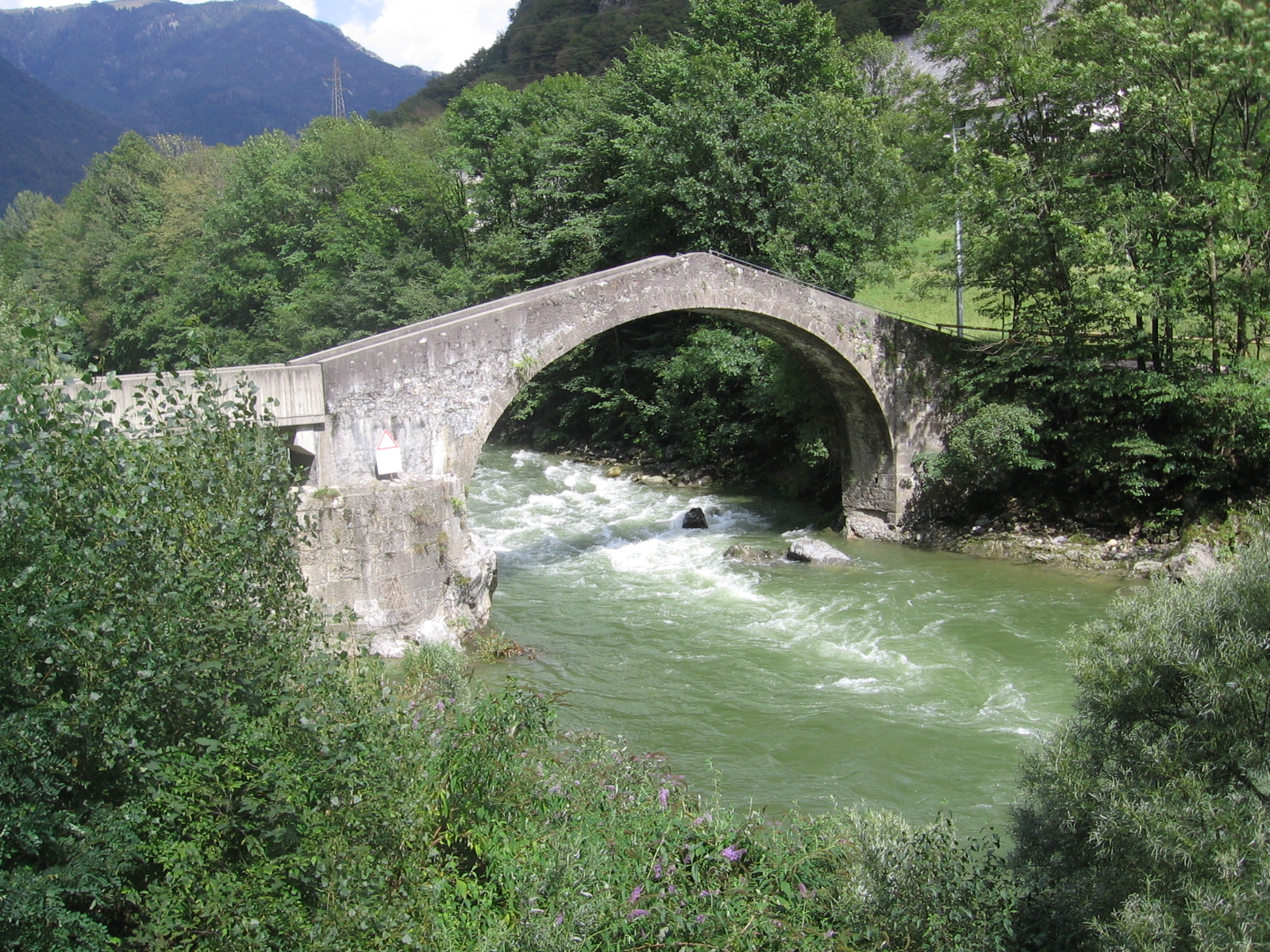 Lenna, Bergamo, Italy